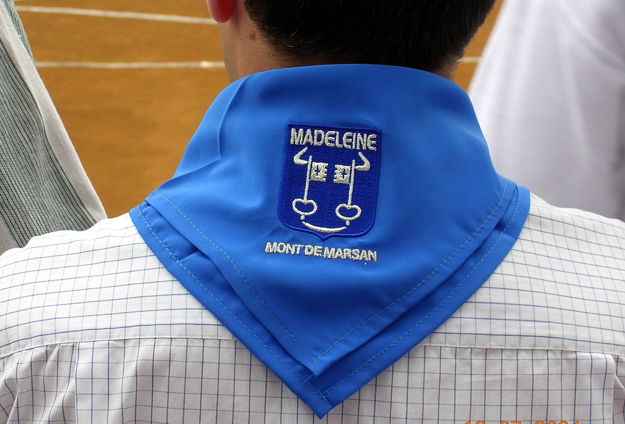 Bandana des fêtes de la Madeleine, photo prise par Jibi44 dans les arènes du Plumaçon, Mont-de-Marsan, Landes, France, en juillet 2004.